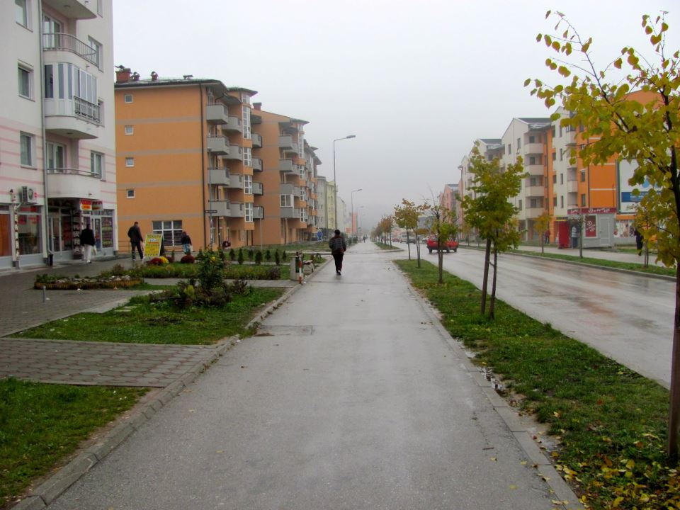 Lukavica, Spasovdanska